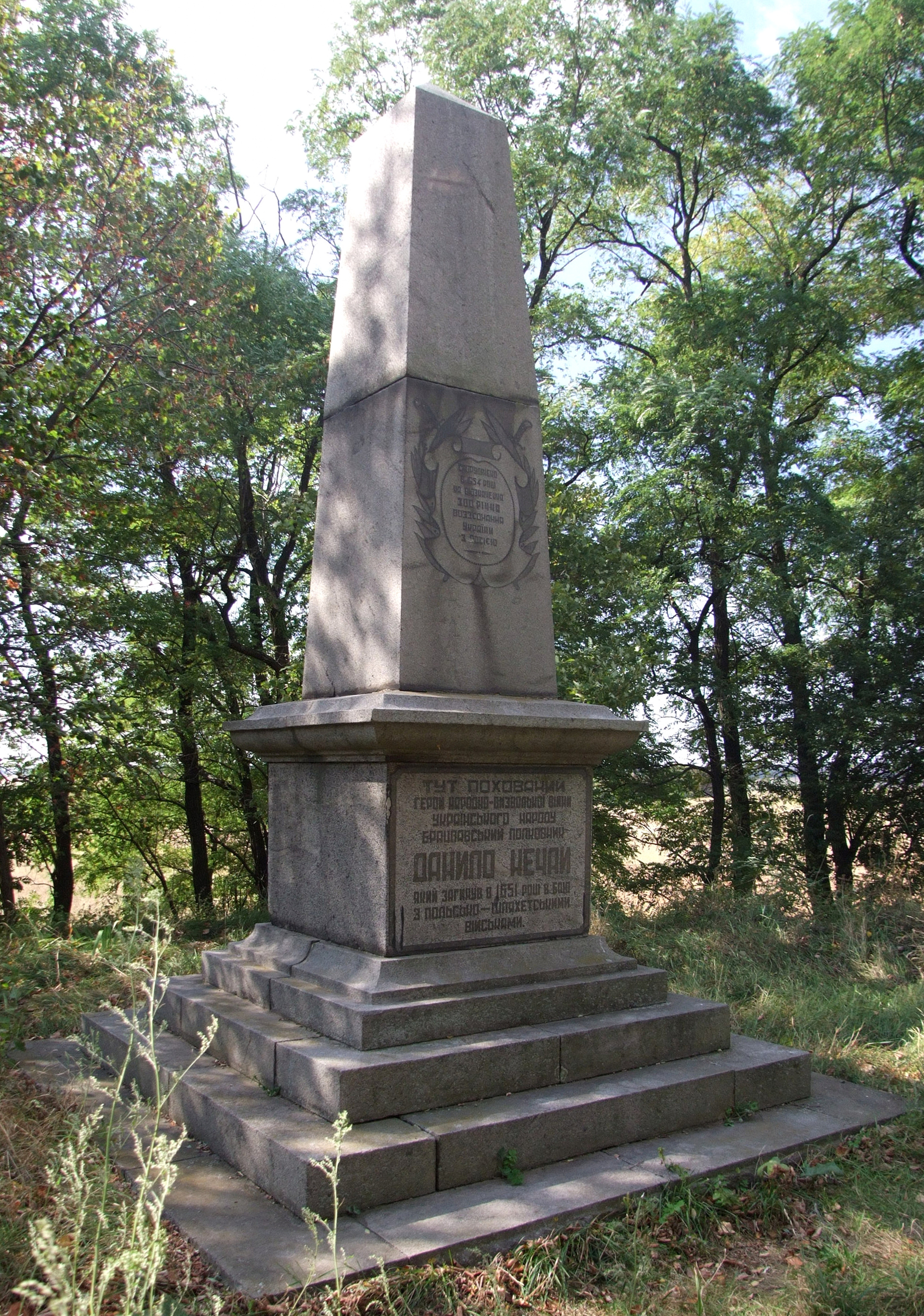 Могила соратника Богдана Хмельницького Данила Нечая. Обеліск, 1954 р.